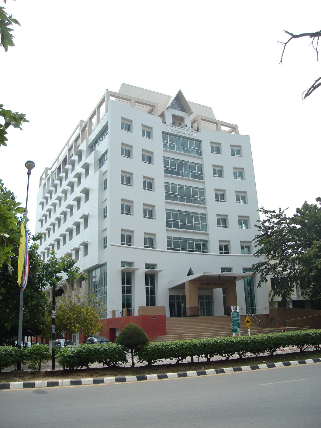 ตึก "ศูนย์สารสนเทศ" ที่ มหาวิทยาลัยขอนแก่น (Khon Kaen University)